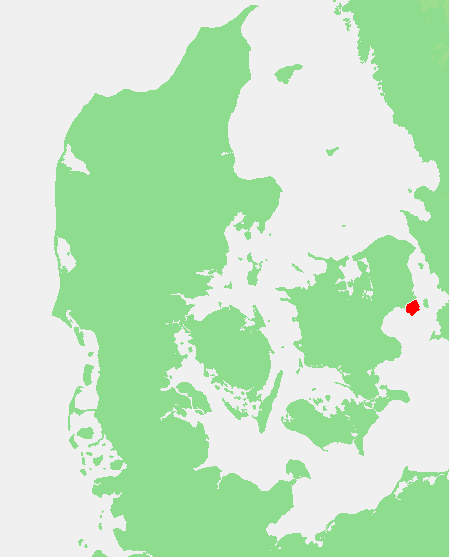 DK - Amagar.PNG